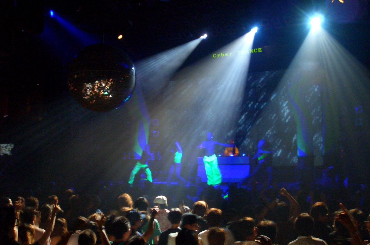 Velfarre, Aug.05